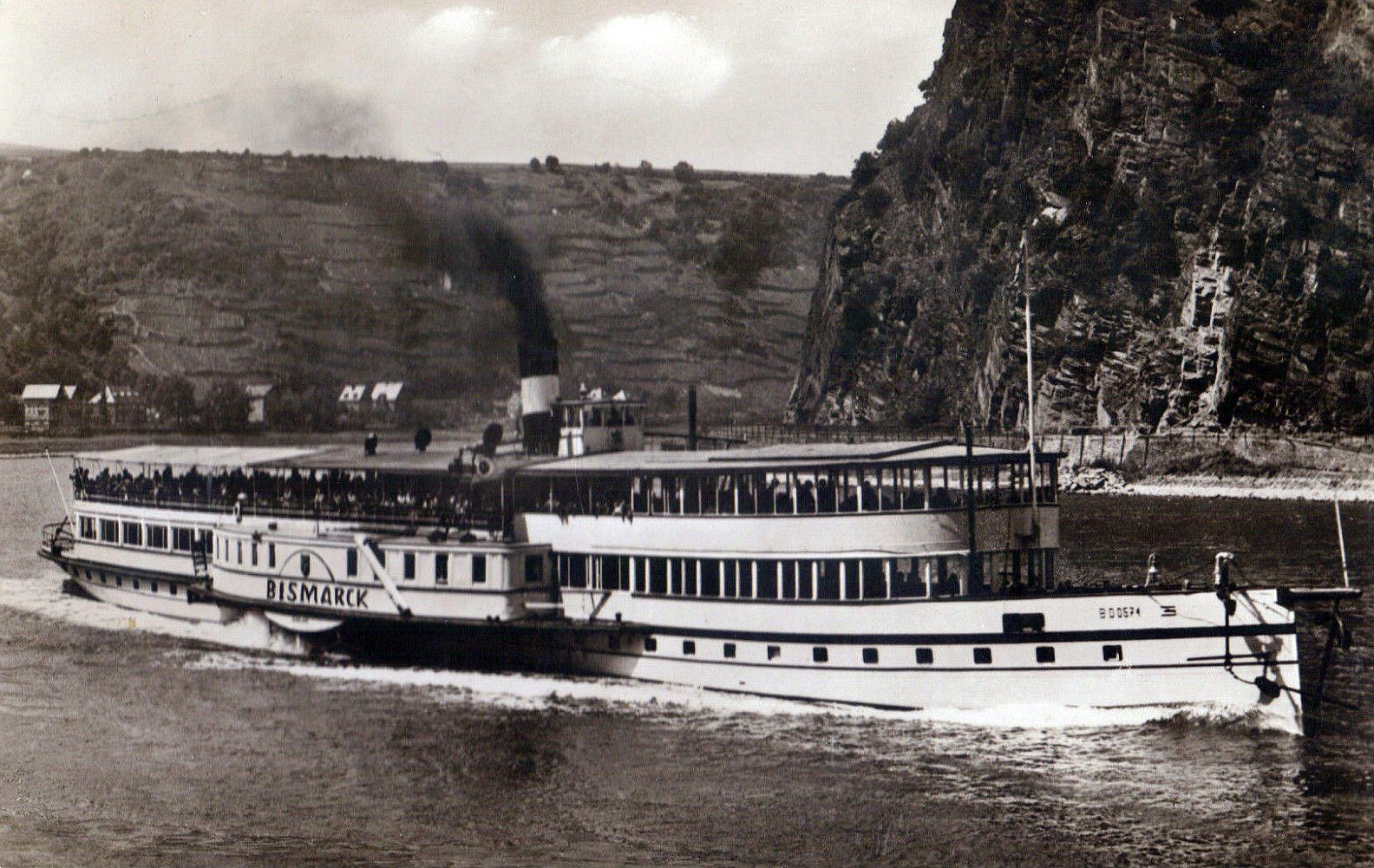 Der Raddampfer Bismarck an der Loreley (1949)